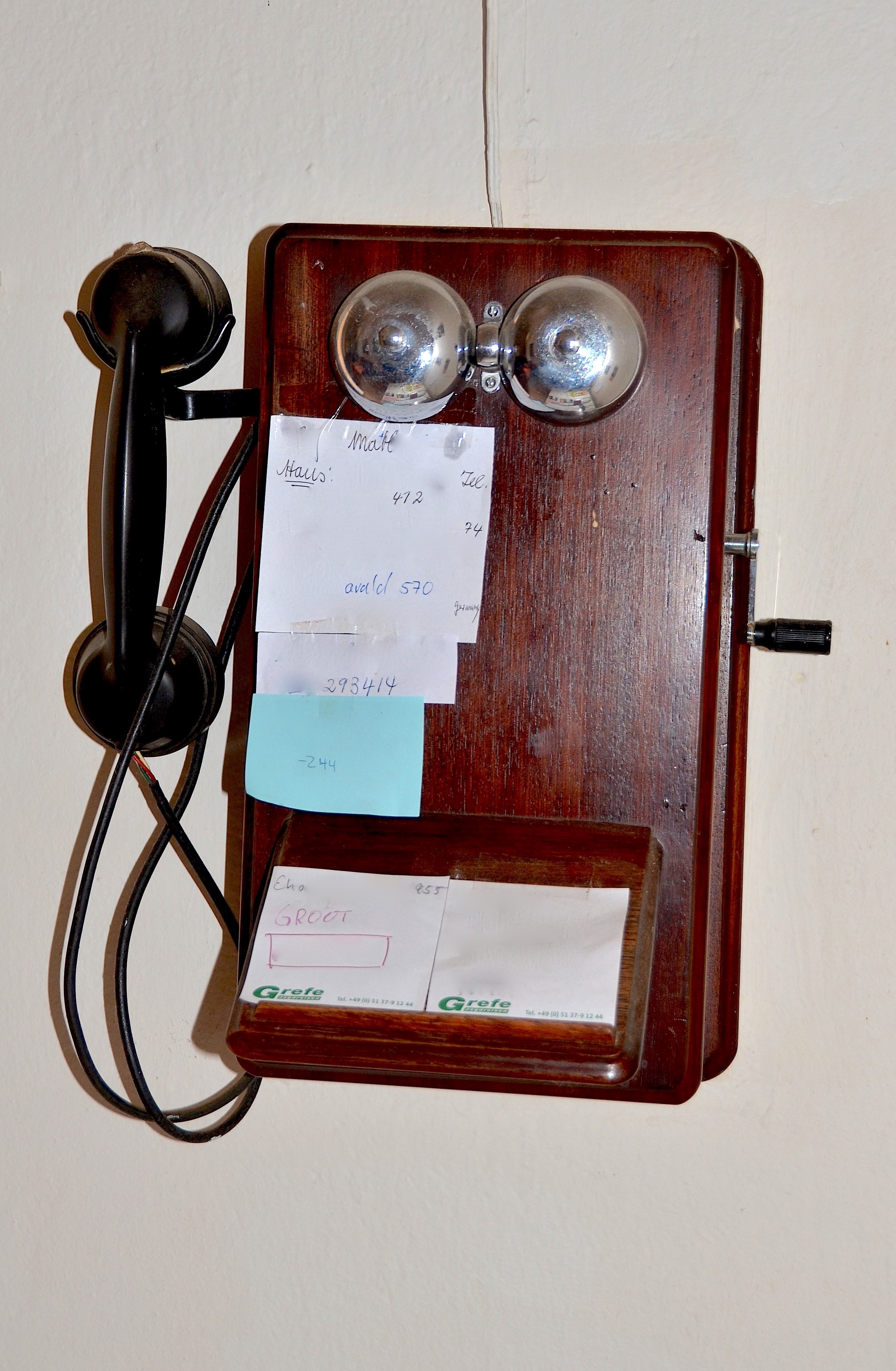 Altes analoges Wandtelefon auf einer Farm in Namibia (2014)